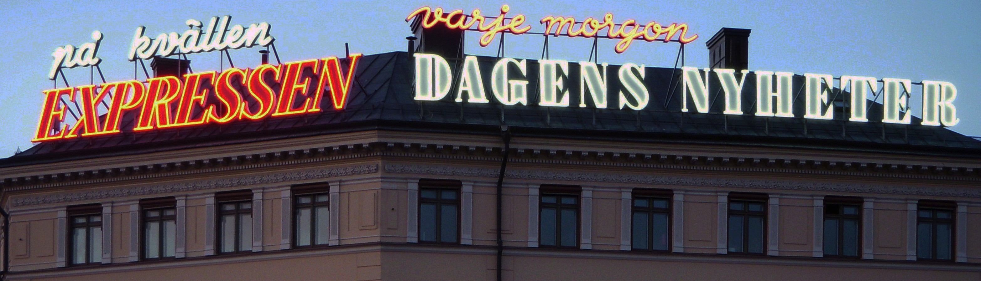 Neonreklam på huset Medusa 1 i Gamla stan